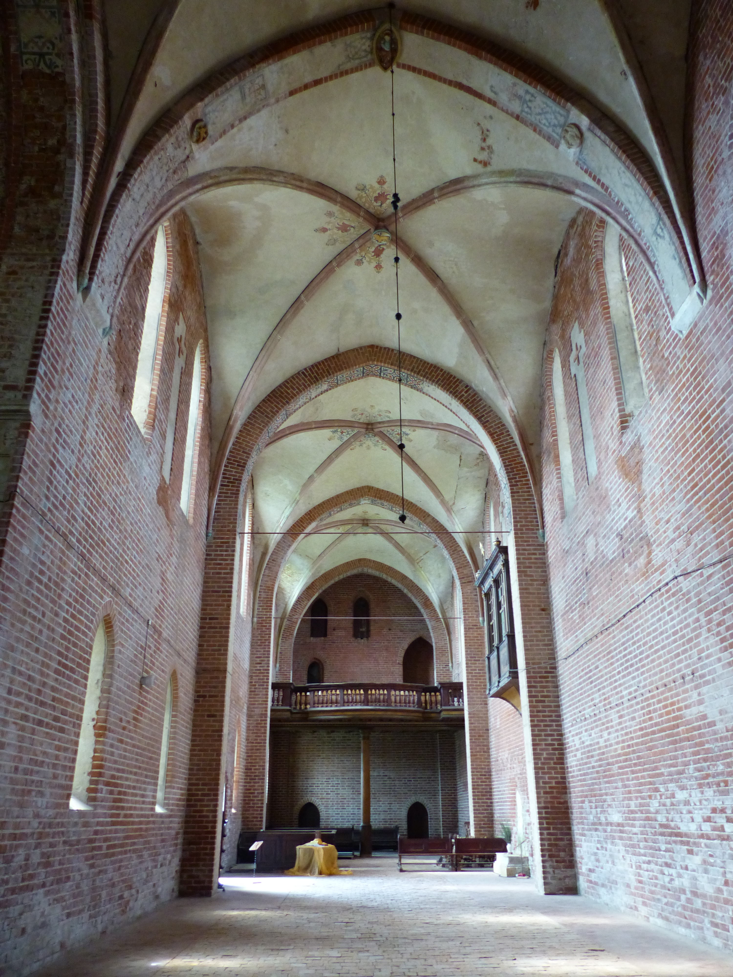 Klosterkirche St. Maria (Mühlberg an der Elbe), Brandenburg